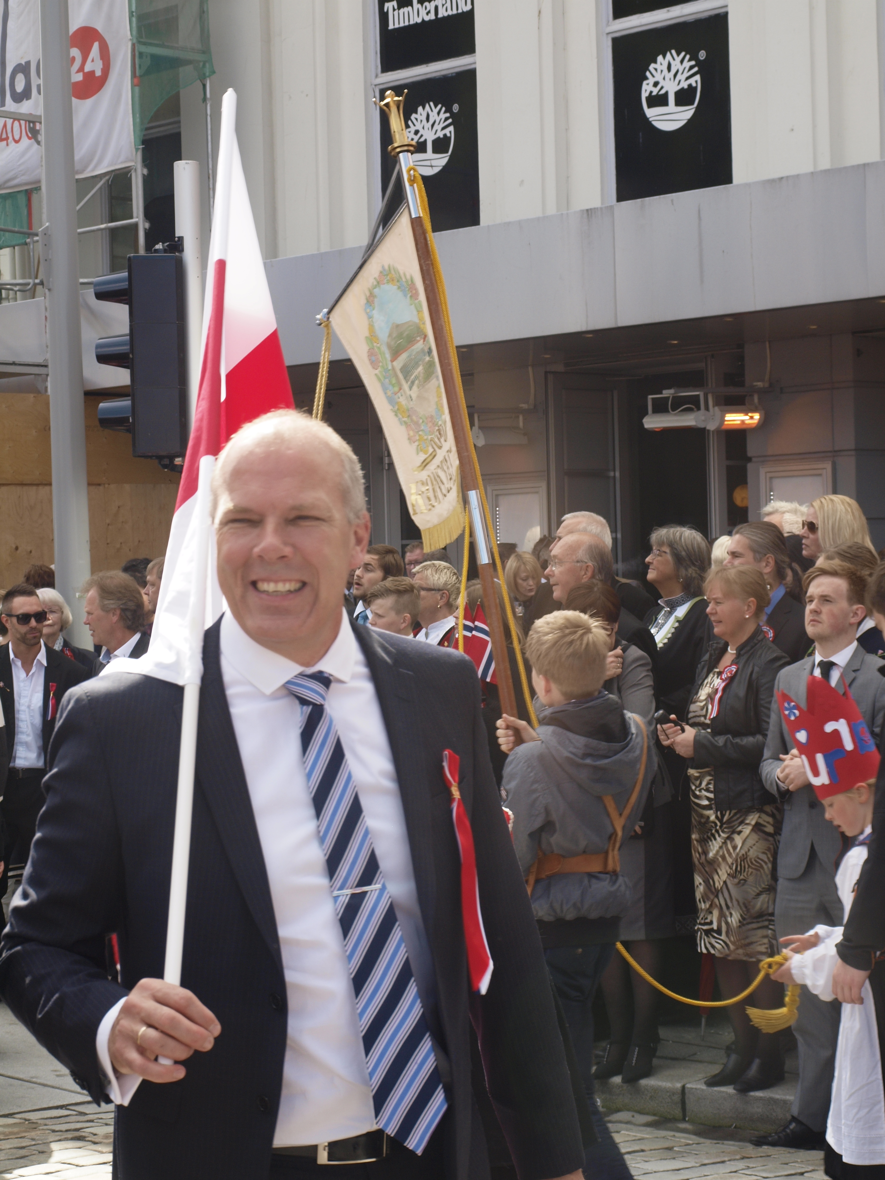 Roald Bruun Hansen 2014